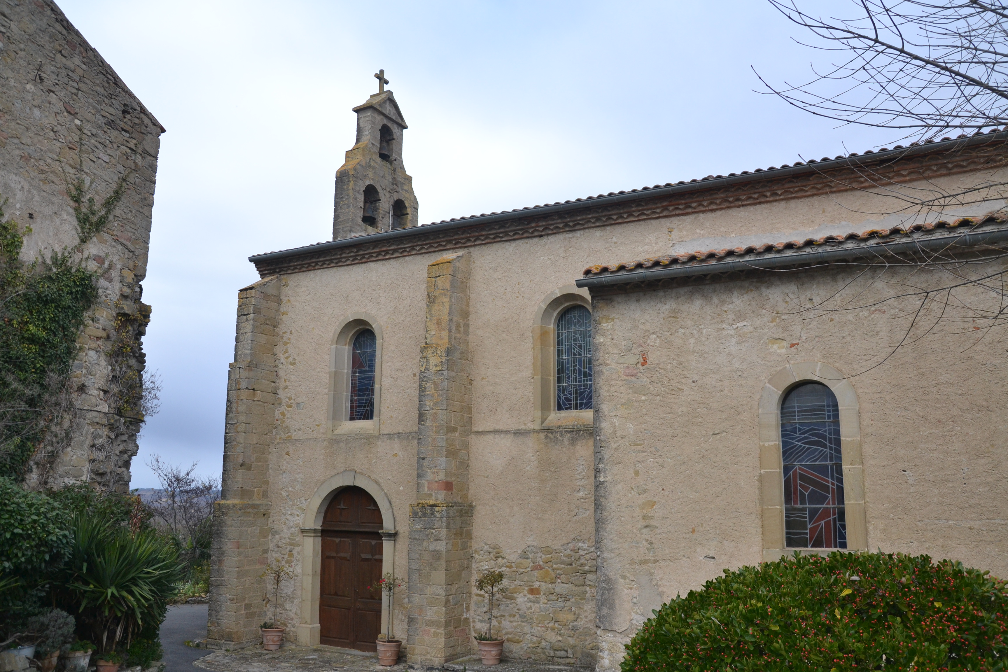 L'église Saint-Martin de Roumengoux (Ariège, France).